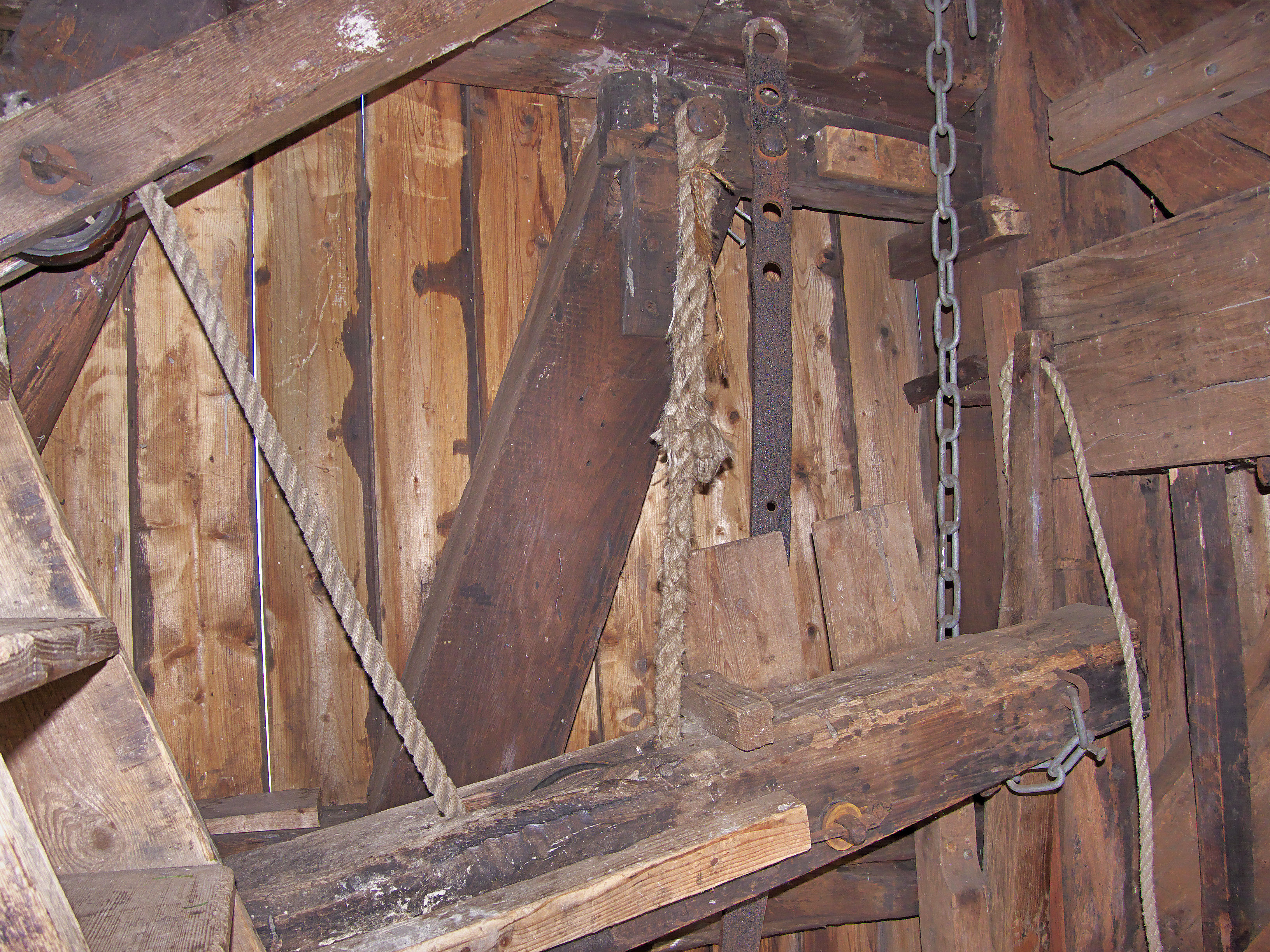 Stijve Molen, vangbalk met evenaar en kneppel. Ook een katrolschijf in de vangbalk.